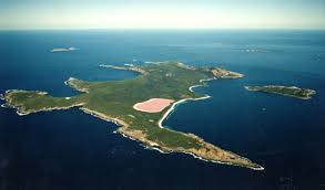 Vendndodhja e Liqenit Hillier